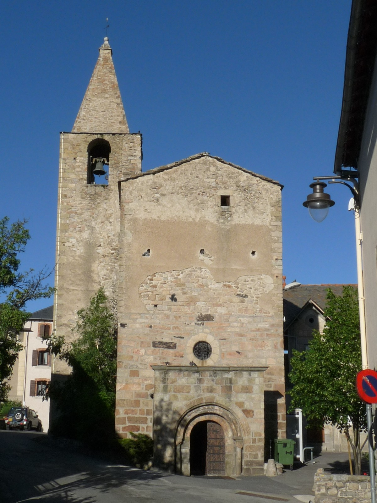 Eglise d'Odeillo, Font-Romeu, Pyrénées-Orientales, France